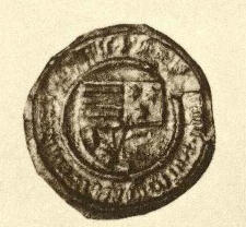 This is a scan of the historical document: Title: Die Siegel der deutschen Kaiser und Könige v. 2 (1347 - 1493)